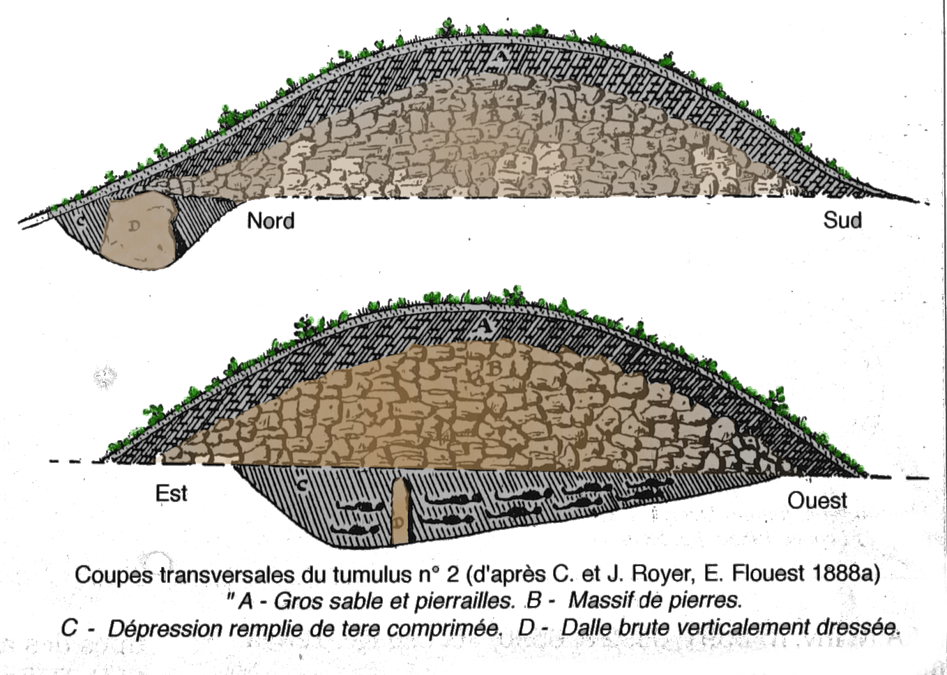 dessin de cf. titre.